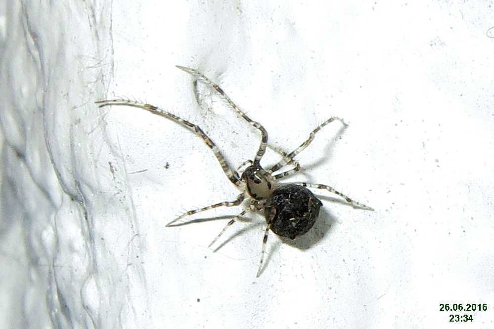 cf. Ero tuberculata (FG)